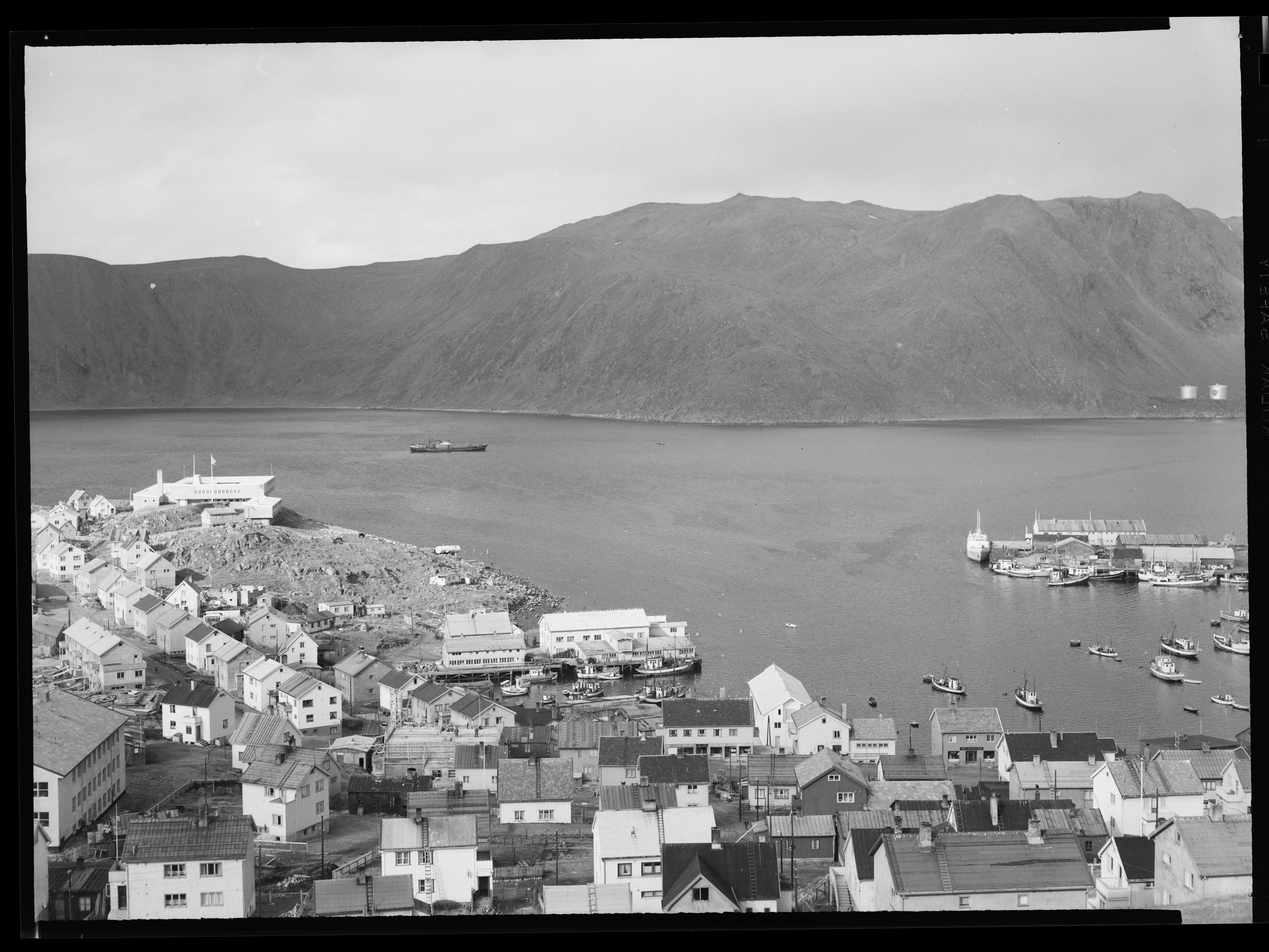 Bildet er hentet fra Nasjonalbibliotekets bildesamling. Anmerkninger til bildet var: Fotograf: L.S Honningsvåg, Nordkapp, Finnmark